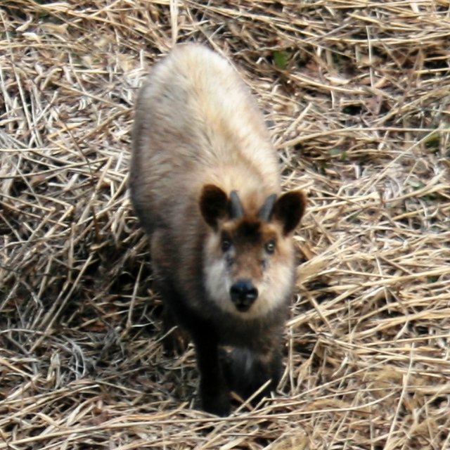 ニホンカモシカ 三方岩岳の麓にて